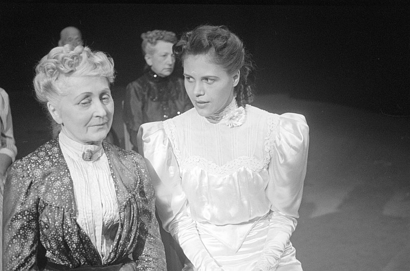 Original image description from the Deutsche FotothekSzenenbilder